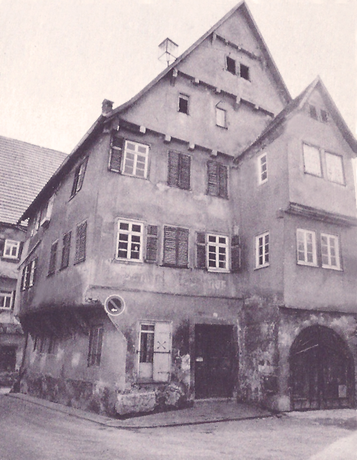 Haus mit Markthalle aus dem frühen 15. Jhdt. in Markgröningen (1973 abgerissen)